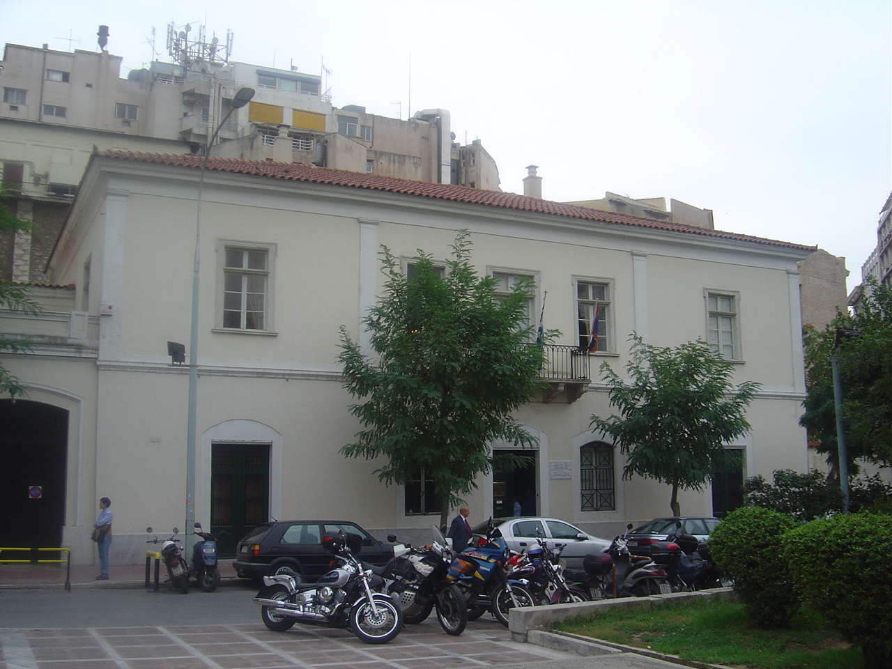 Το Αρχοντικό Δεκόζη Βούρου, μετέπειτα ανάκτορο του 'Οθωνα, στην Αθήνα, Πλατεία Κλαυθμώνος